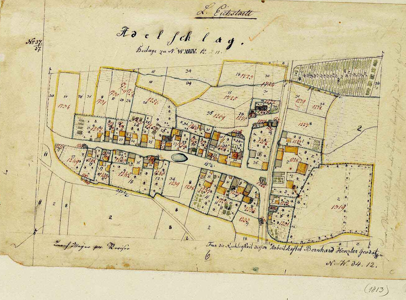 Historische Ortskarte von Adelschlag von 1813. Maßstab: 1:2500.